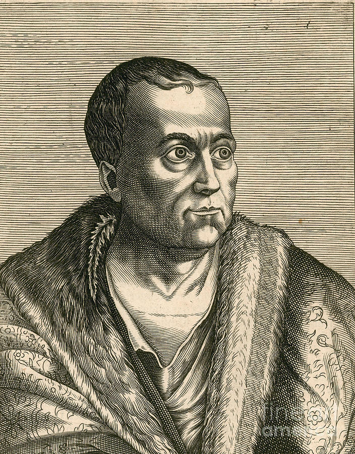 Pierio Valeriano